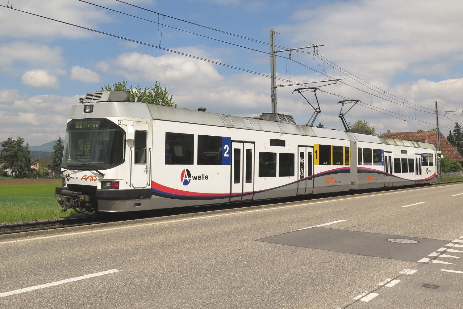 AAR bus+bahn (AAR), Doppeltriebwagen der Wynental- und Suhrentalbahn (WSB) im Wynental 2014.